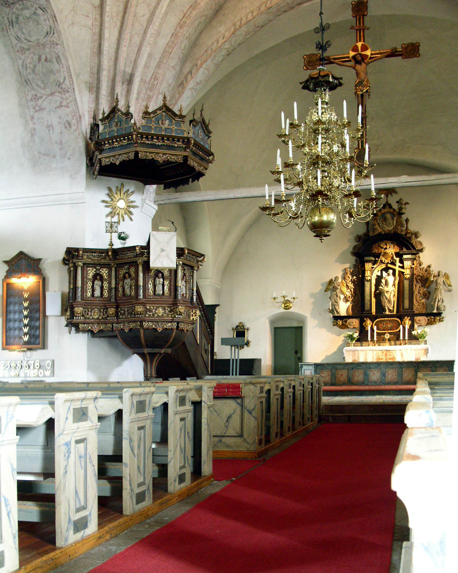 Interiör, Rättviks kyrka, Dalarna